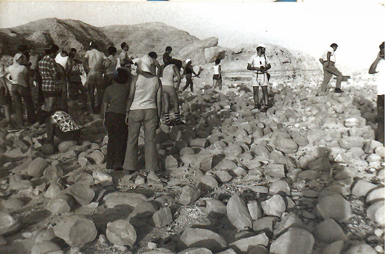 בובוסים בהר צין